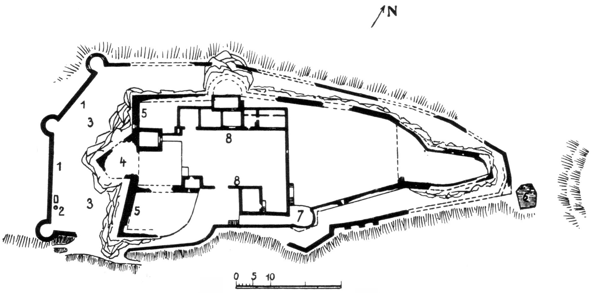 Grundriss der elsässischen Burg Herrenstein